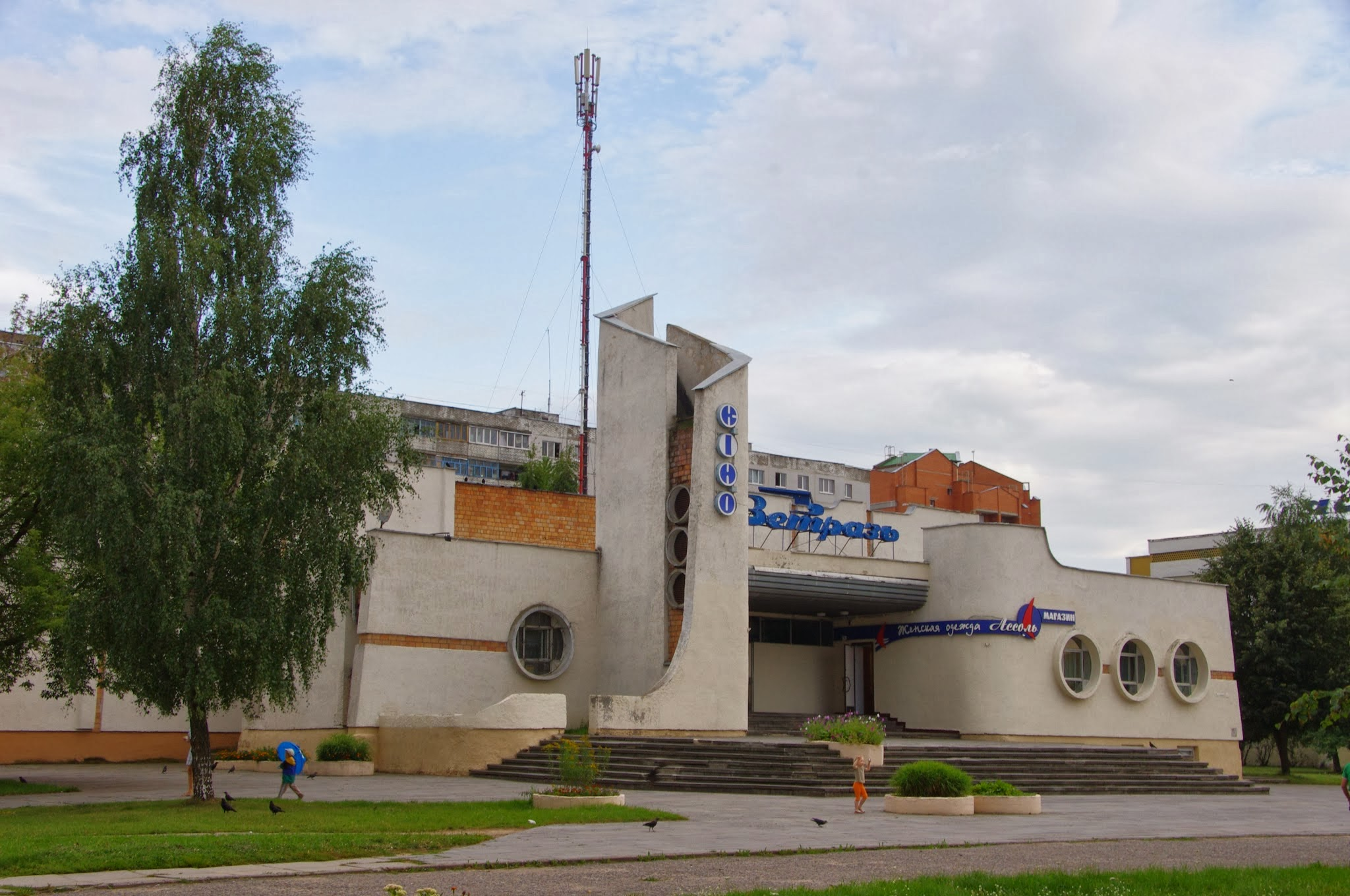 Zadniaproŭje № 3, Mahilioŭ, Belarus